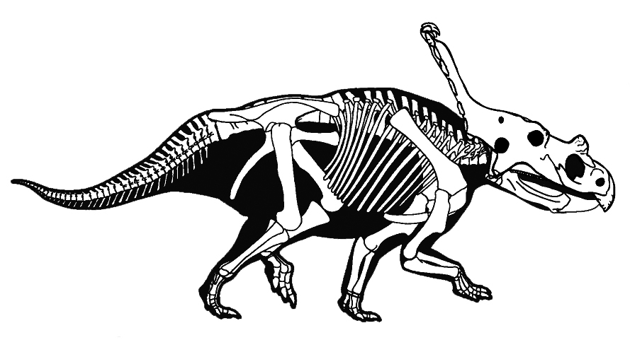 Vagaceratops skeletal restoration.